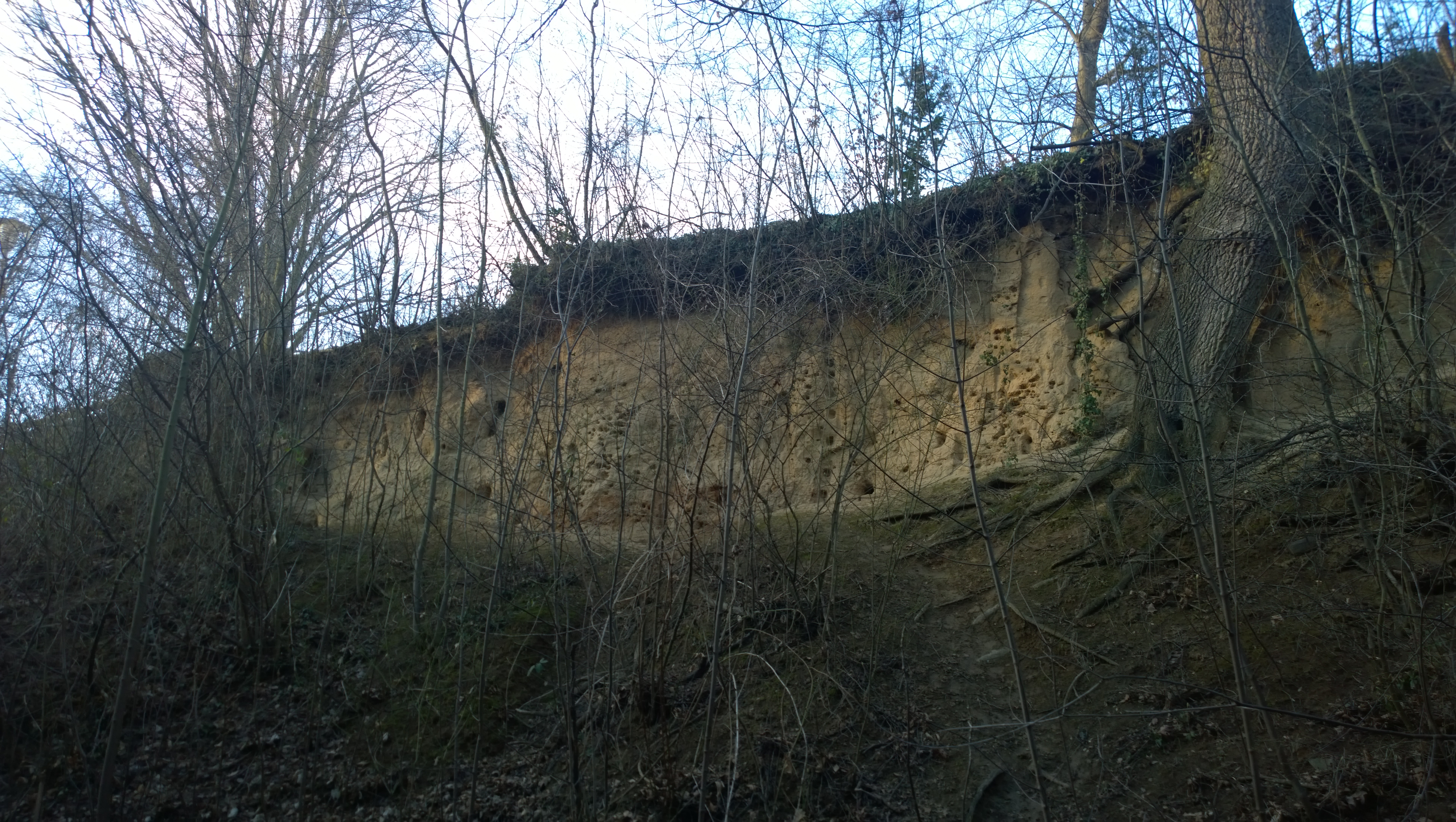 Eine Seite der Steinbornshohl mit der Lößabbruchkante und den vielen Vögelhöhlen.